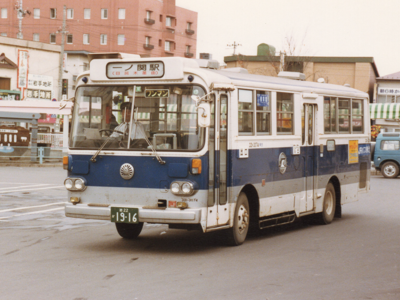 一ノ関駅前にて撮影 ネガ紛失にて、撮影時期不明